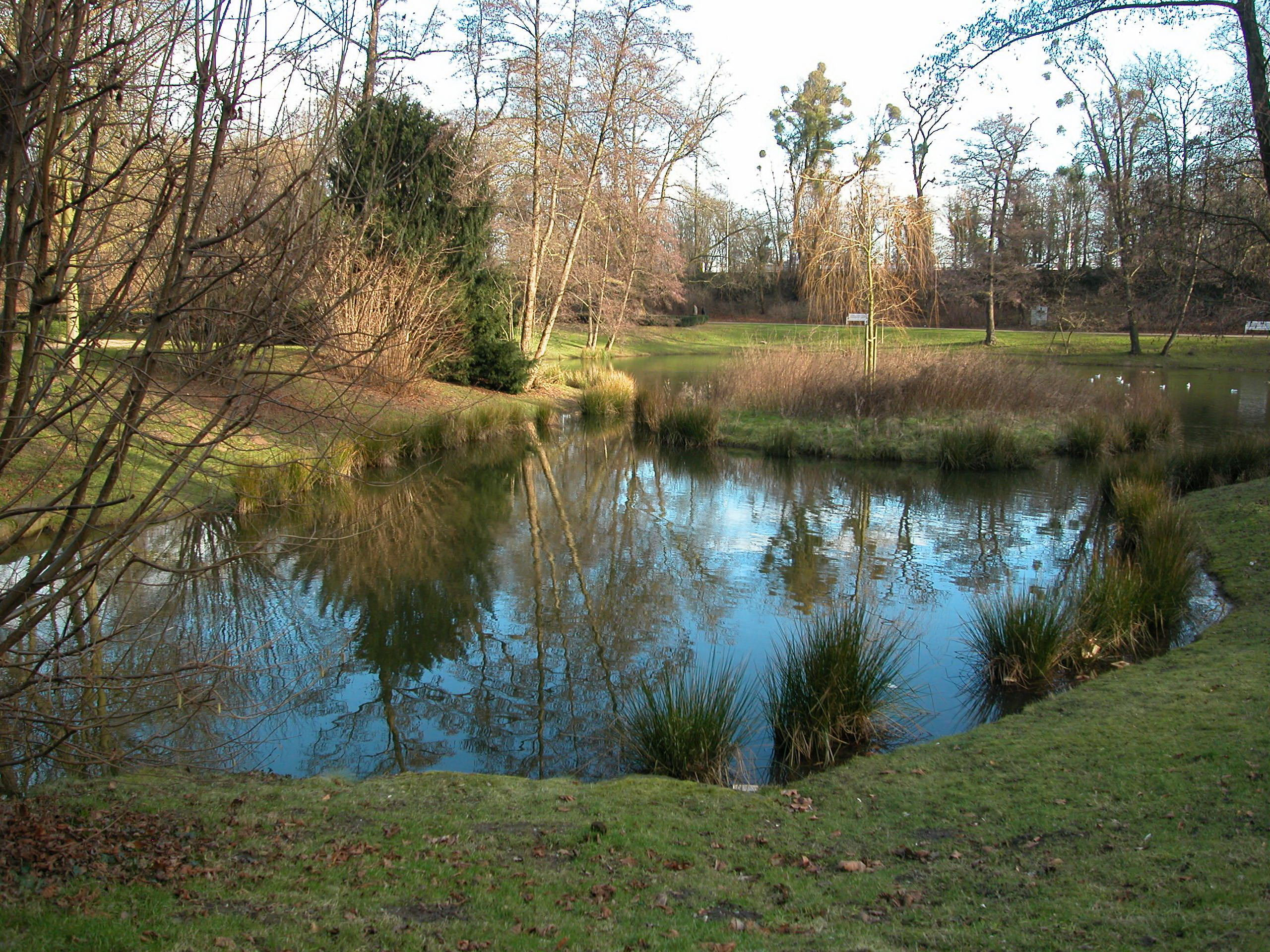 Im Raffelbergpark, Mülheim Standort:51°26′22.2″N 6°49′22.6″E / 51.4395°N 6.822944°E